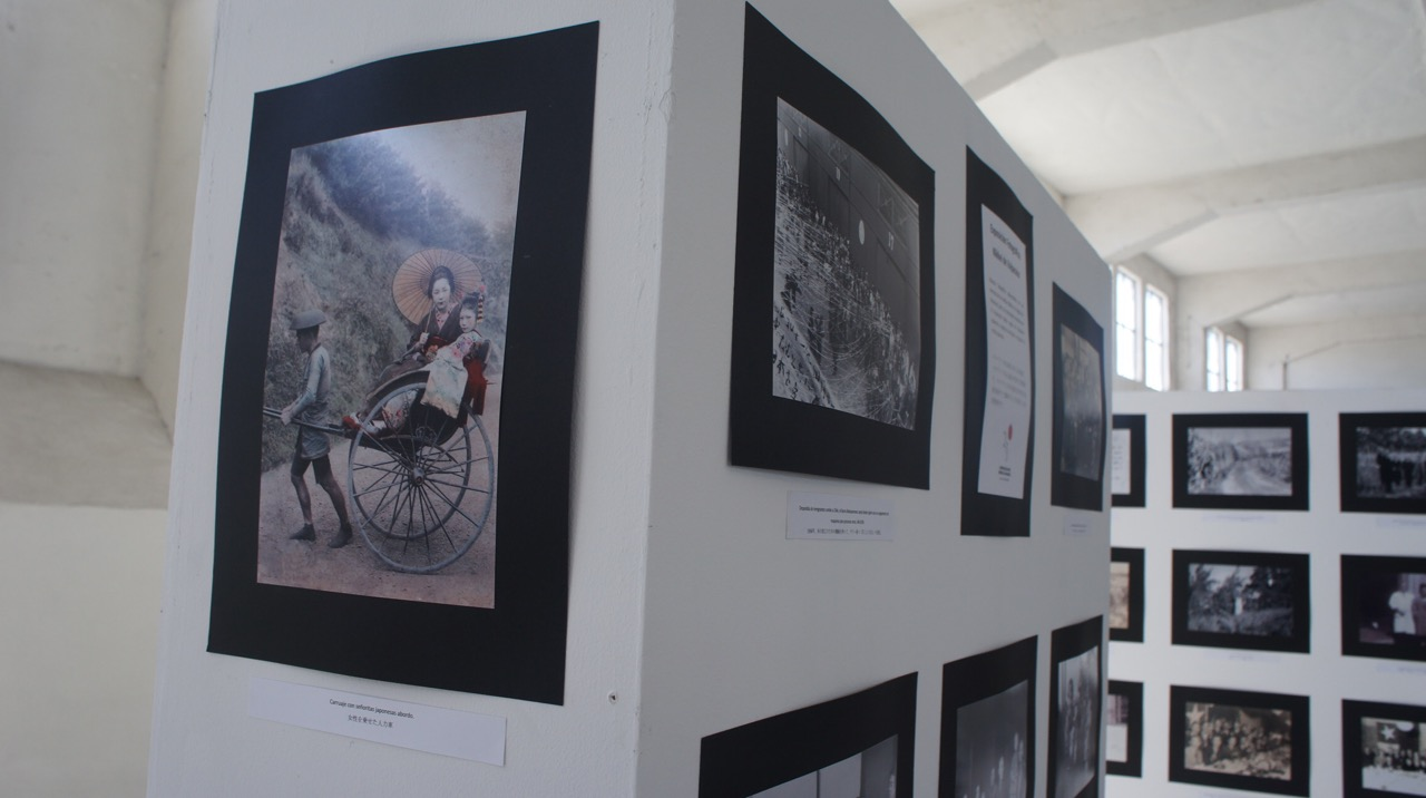 チリへの日本人移住の歴史